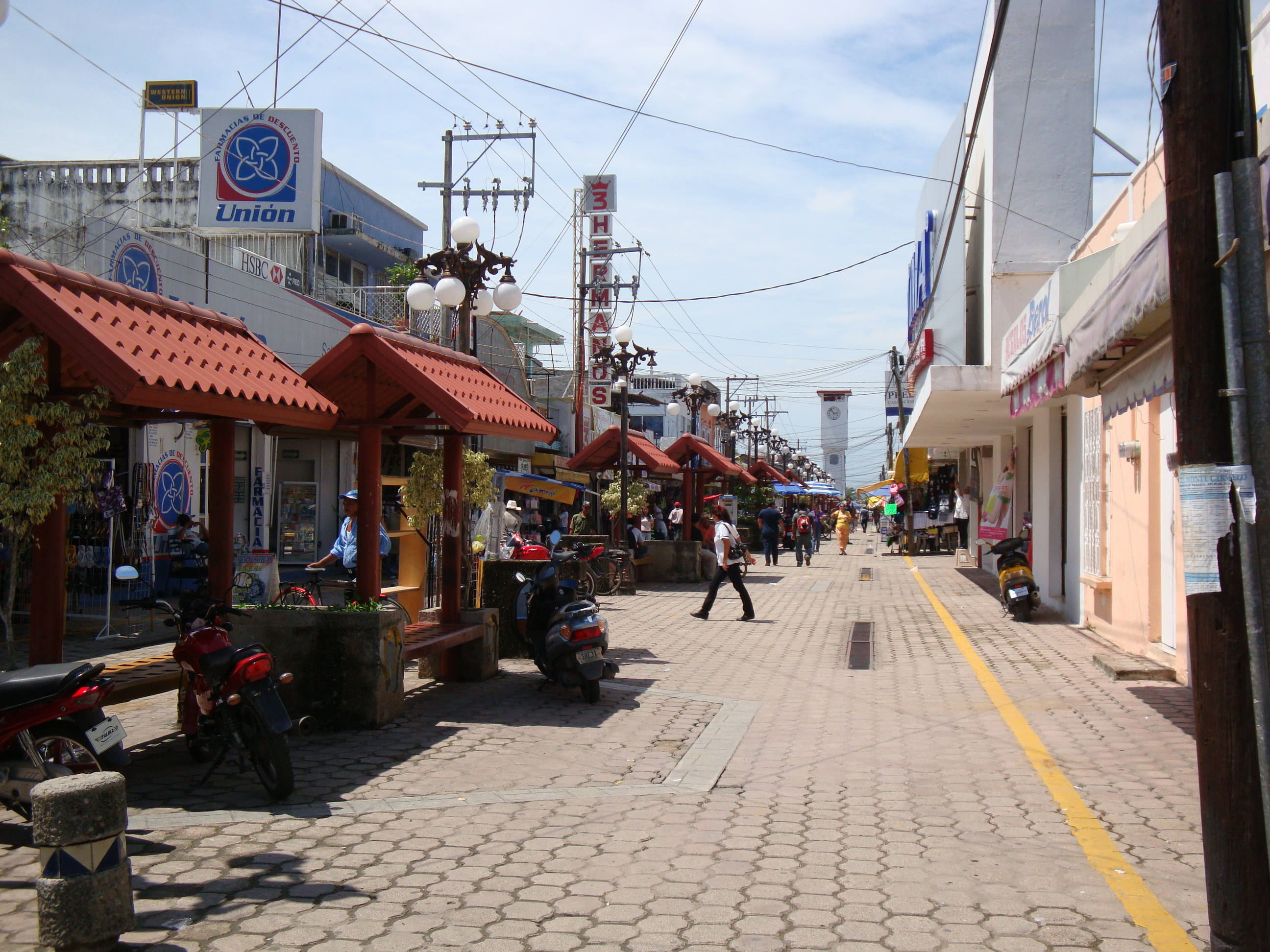 Calle peatonal en el centro de la ciudad de Huimanguillo, Tabasco, México.